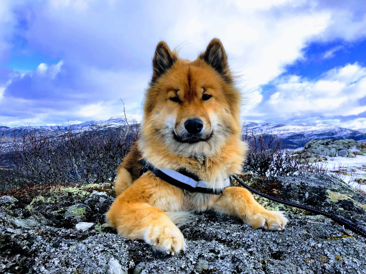 Eurasier trives godt i kaldt vær.